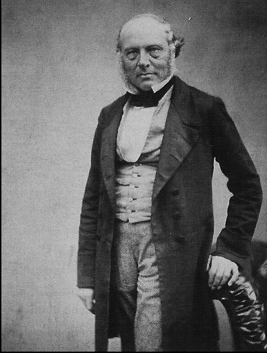 Public Domain, da Fotograph über 70 Jahre tot ist ...Sicherlich 14:51, 4. Nov 2004 (CET)